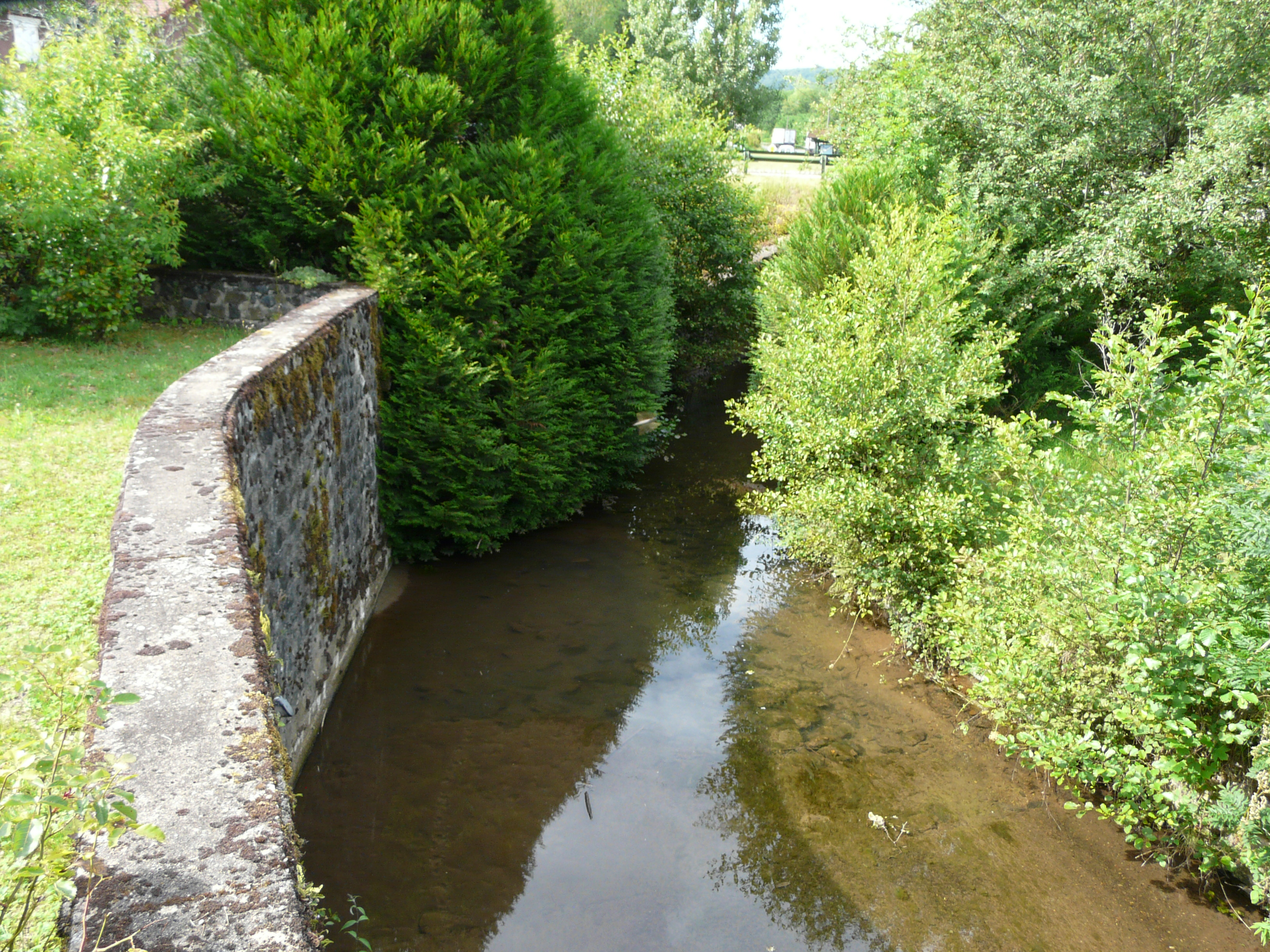 La Ménoire au lieu-dit le Moulin-Abadiol, Beaulieu-sur-Dordogne, Corrèze, France. Vue prise en direction de l'amont.